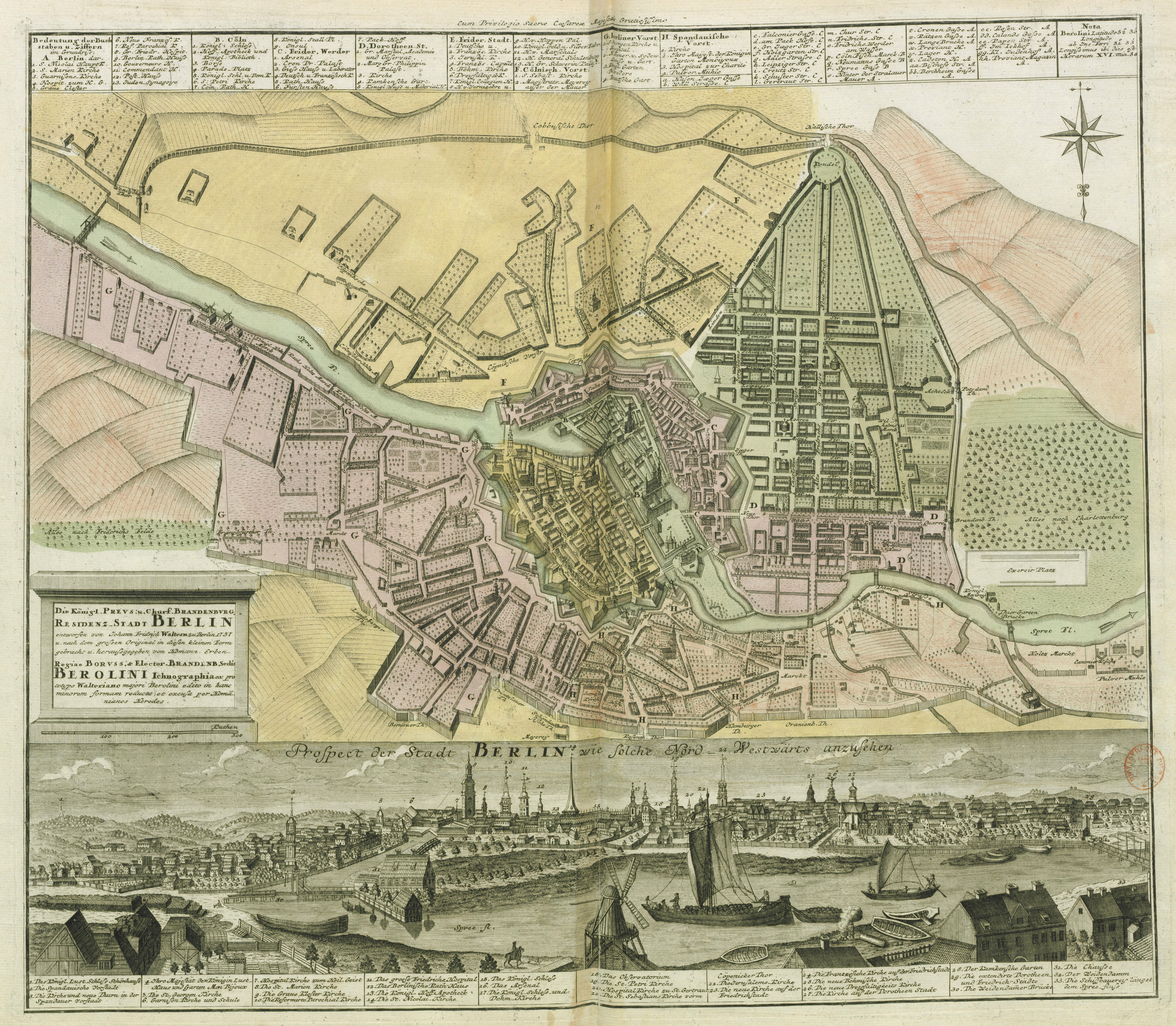 Präzise verkleinerte Kopie des Plans von J.F. Walther von 1737. Links unten ein Block aus Steinplatten mit dem Titel (deutsch und latein); im Sockel ein Maßstab über 300 Ruthen; über der Karte eine Legende und Angaben zur geografischen Länge und Breite; rechts oben eine Windrose.